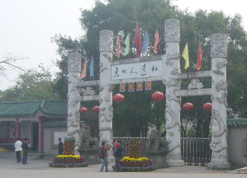 马坝人遗址公园大门 拍摄人：竹围墙 2006年2月1日